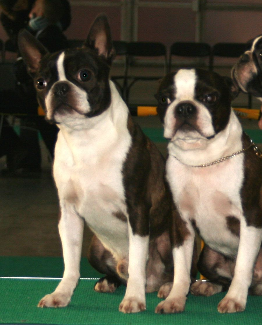 Boston_teriery na Światowej Wystawie Psów Rasowych w Poznaniu